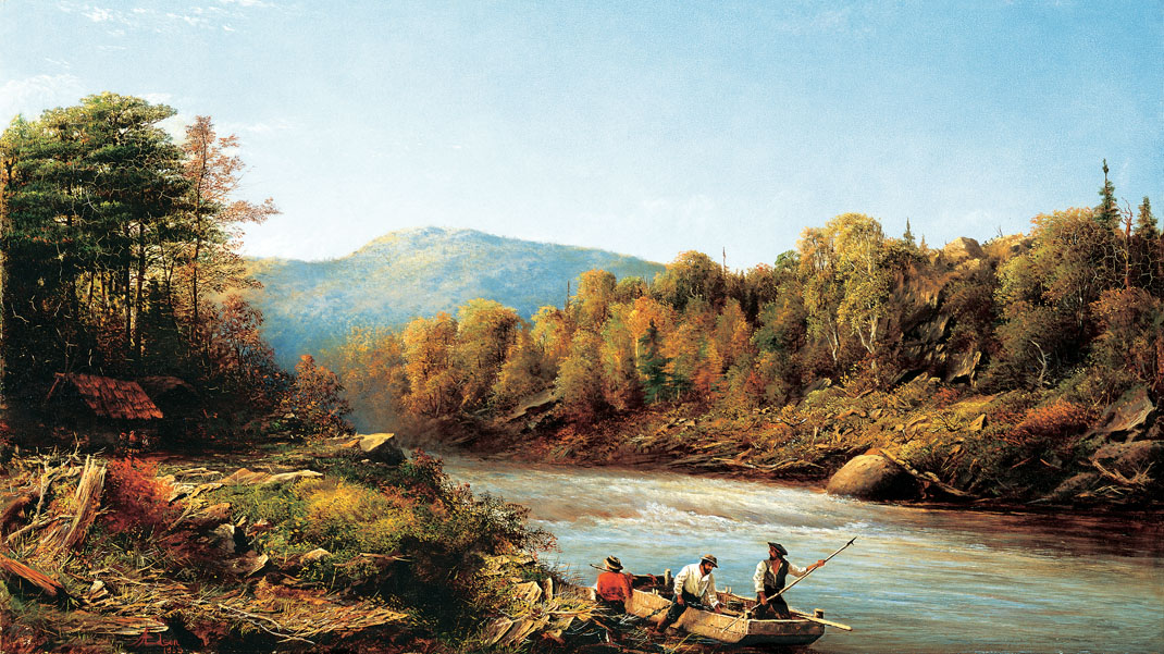 Alla Edson - Bûcherons sur la rivière Saint-Maurice (1868). Huile sur toile 58,5 x 101,5 cm Don de Marian Ives au Musée des Beaux-arts de Montréal, inv. 1940.719